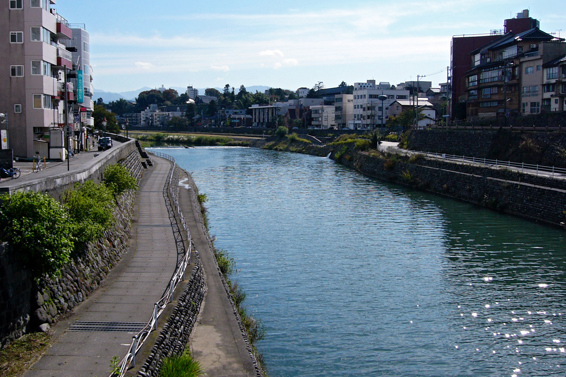 Sai River (犀川), Kanazawa, Ishikawa, Japan